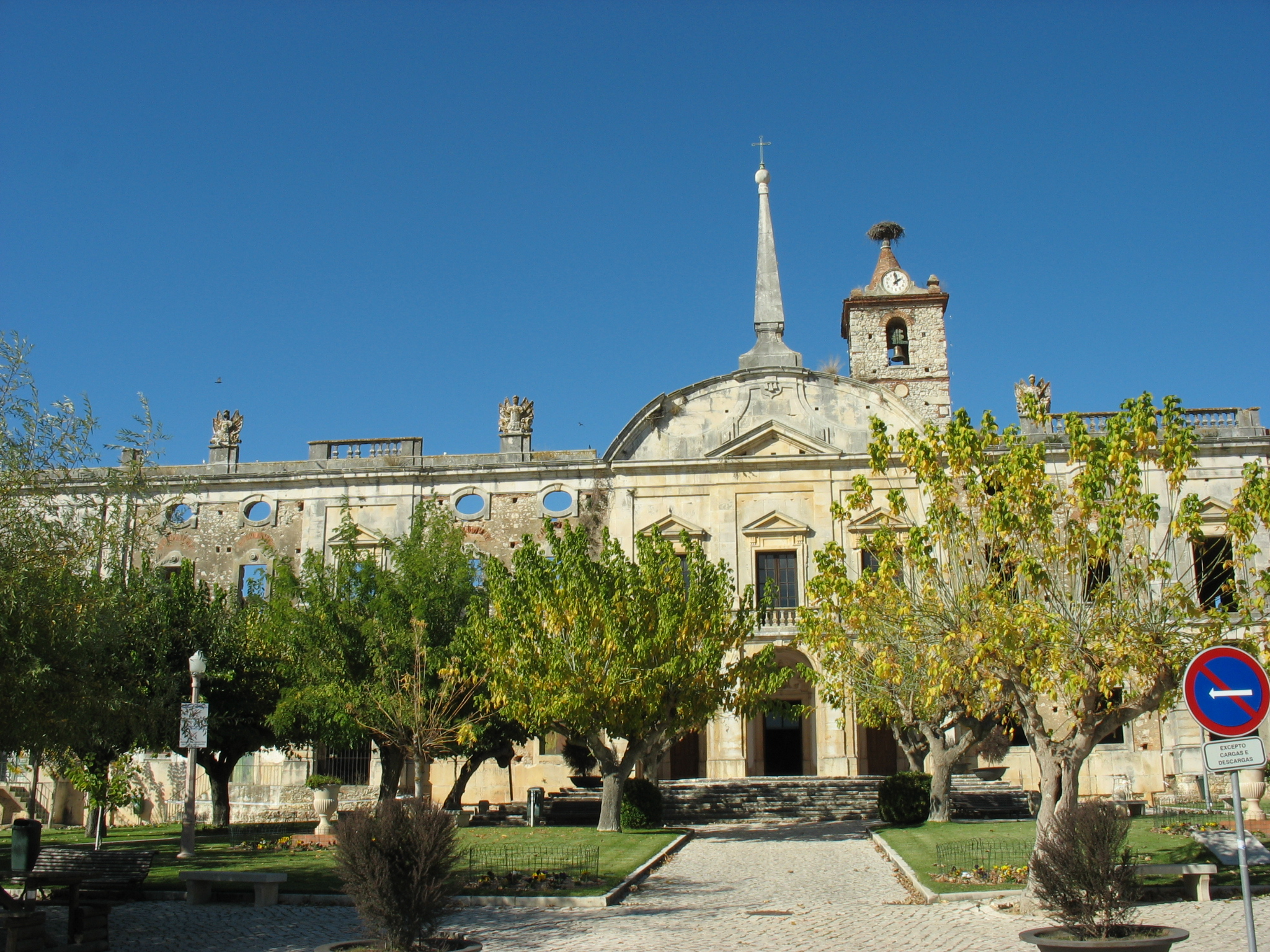 Pina Manique palace ruins in Manique do Intendente (Portugal)